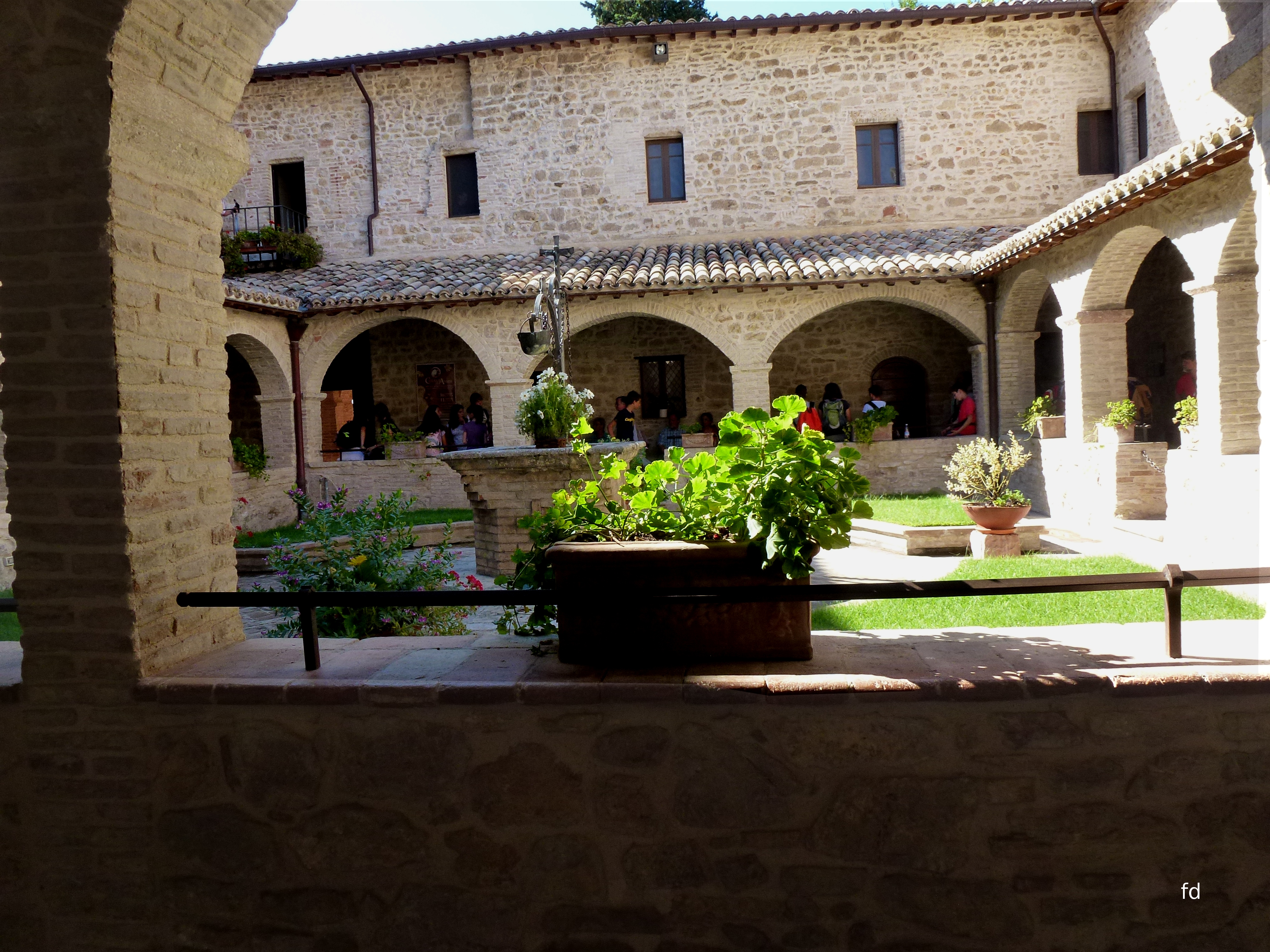 Kloster San Damiano Innenhof